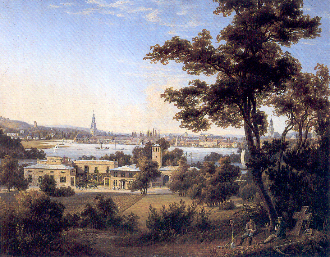 rechts neben dem Ausruhenden das nach rechts geneigte steinerne Sühnekreuz, das bereits z. Zt. des Prinzen Carl nahe der heute stark entstellten exedraförmigen Römischen Bank im Park gestanden hat.